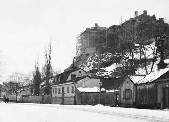 Kvarteret STAMMEN. Fd kvarteret STJÄLKEN. Navigationsskolan. Stigberget. Tjärhovsgatan 59. Tjärhovsgatan 61. Tjärhovsgatan 63. Södermalm.